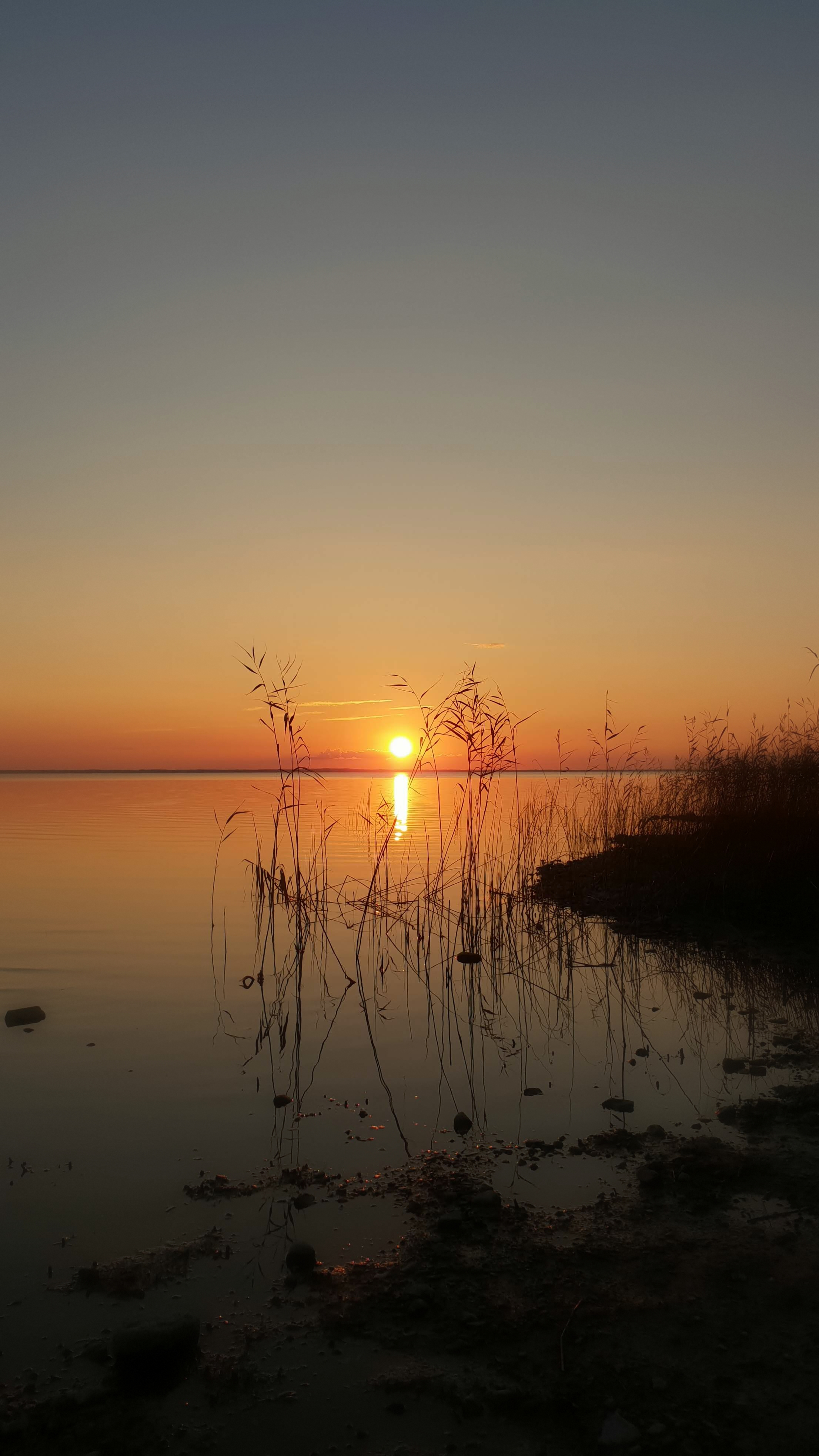 Loojang Tamme külas (Elva)